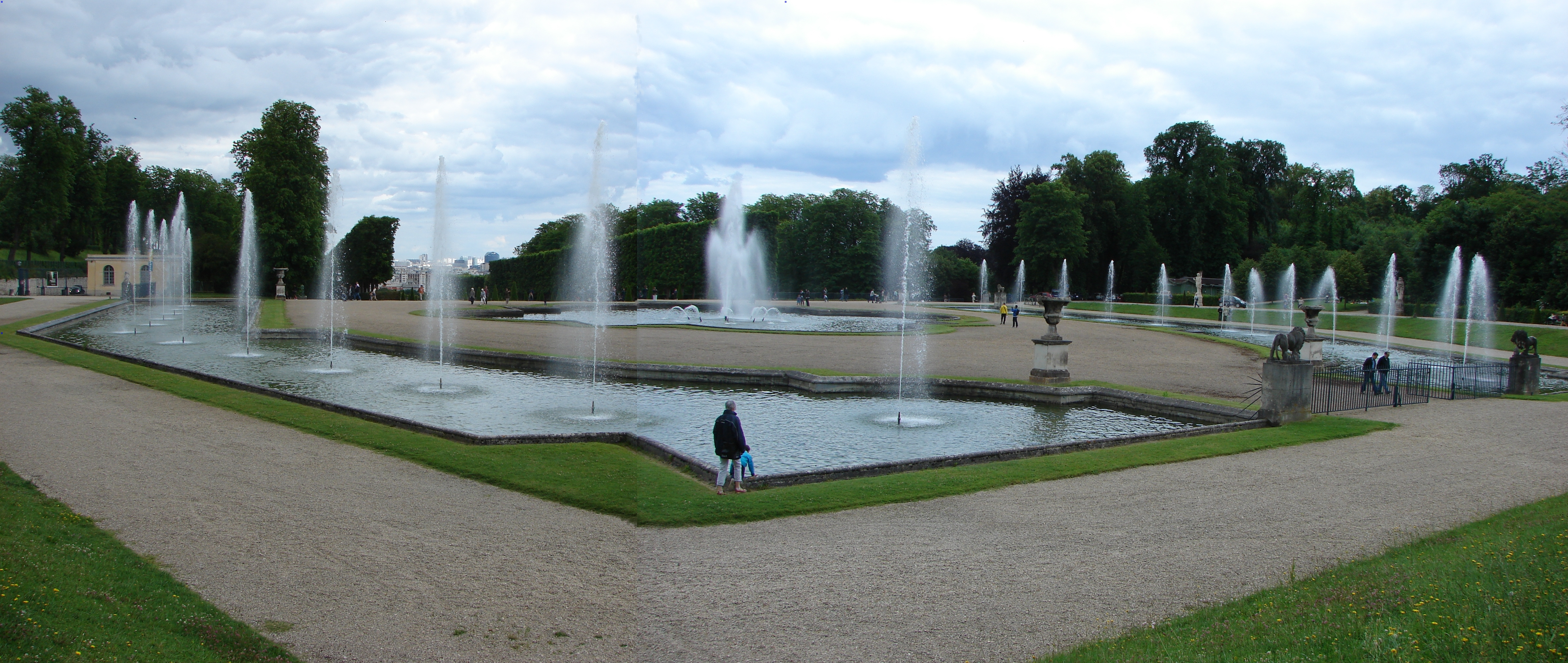 Panorama du Bassin de la petite gerbe au Parc de Saint-Cloud